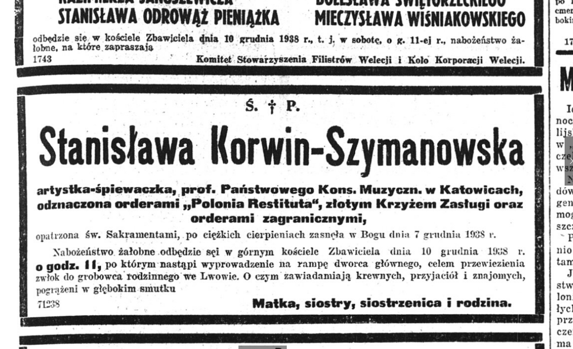 Stanisława Korwin-Szymanowska - nekrolog z dnia 8 grudnia 1938 Kurier Warszawski str.17